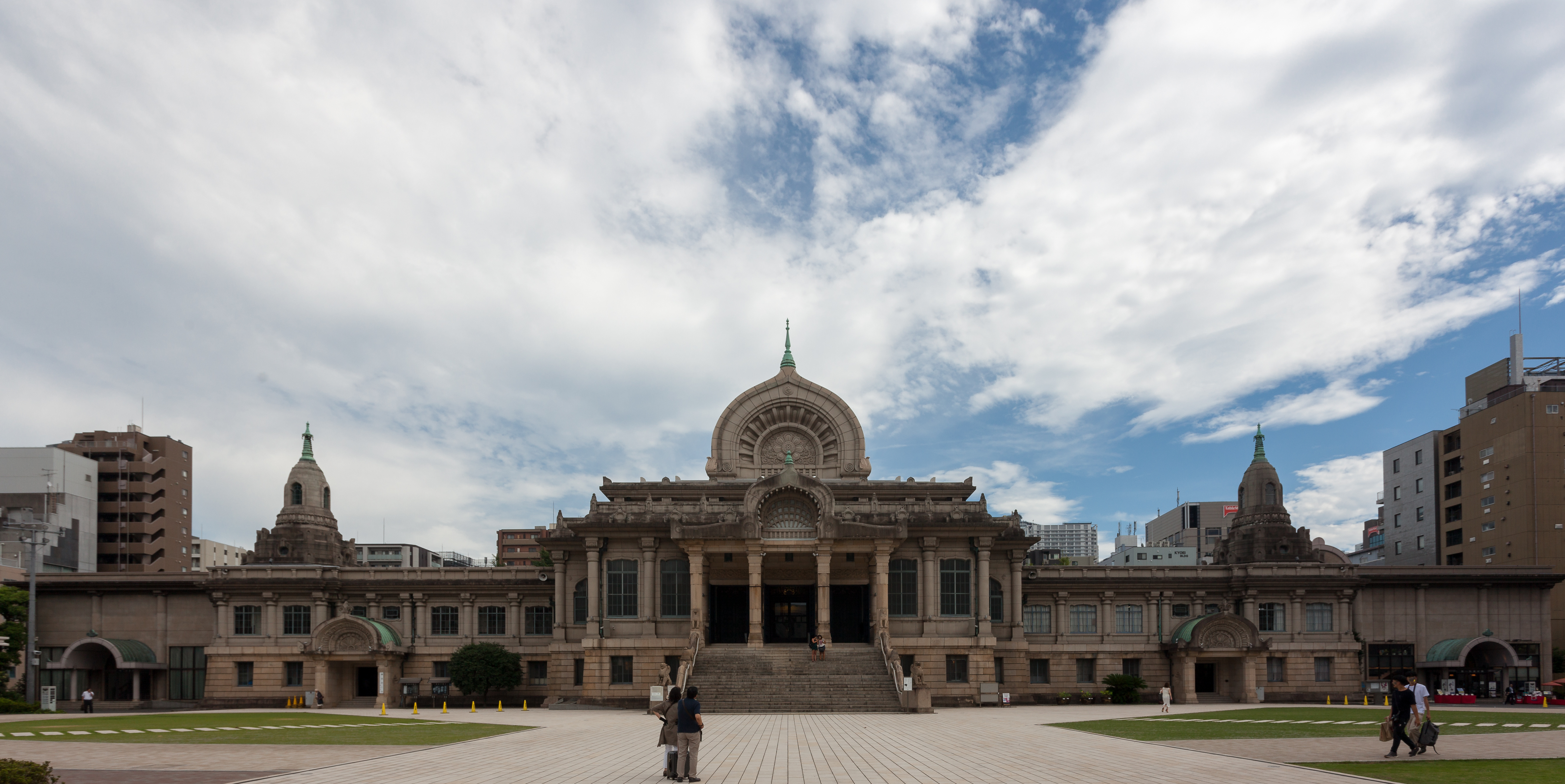 Außenansicht Tsukiji Honganji